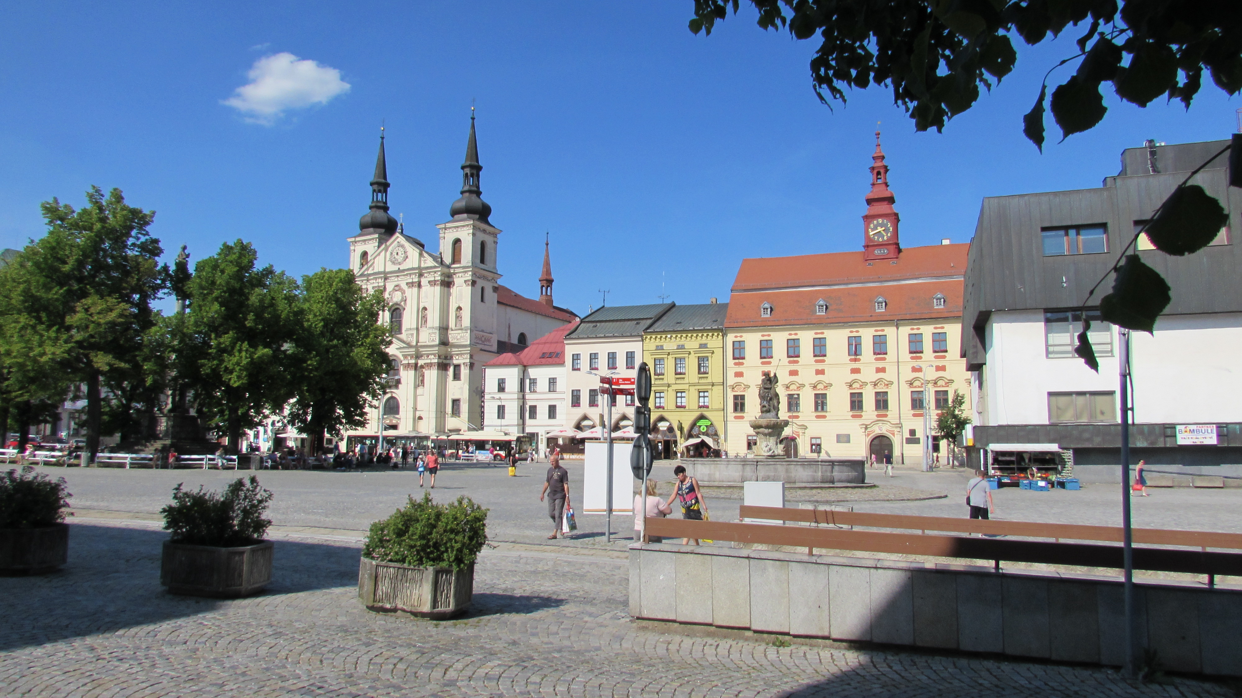 Jihlava Ansicht-4